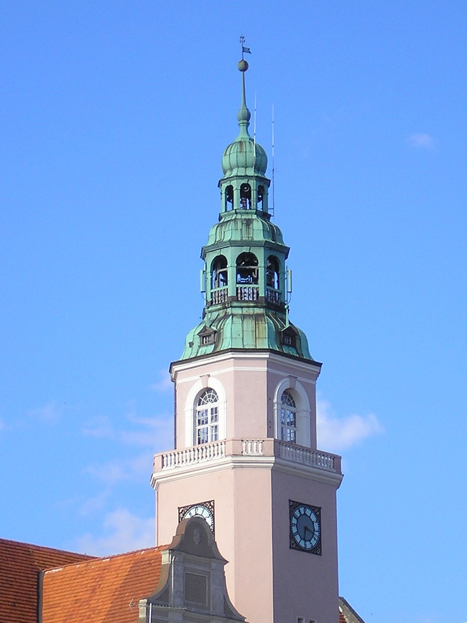 Wieża ratuszowa